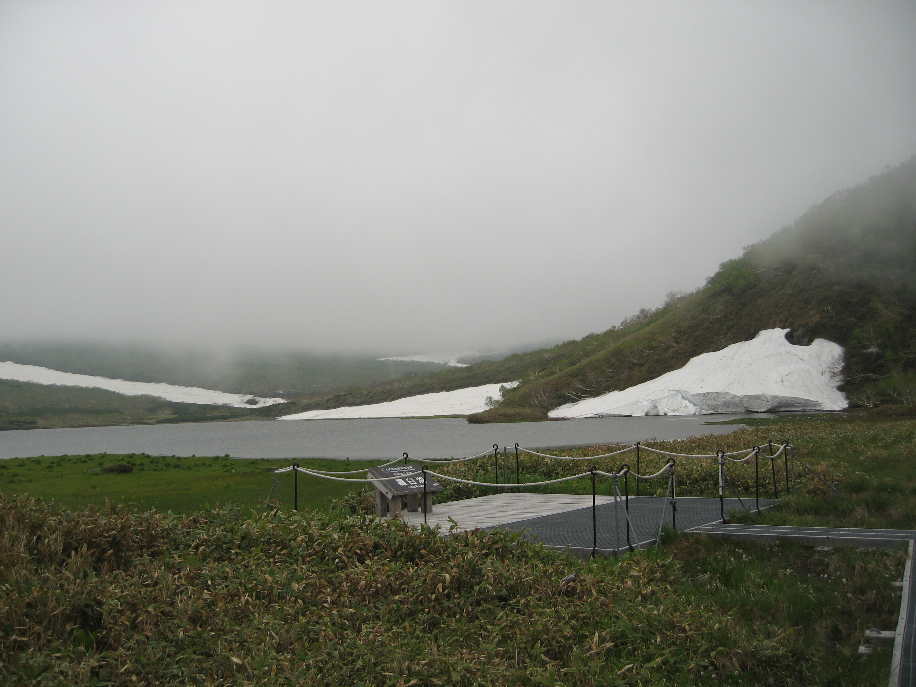 日本の北海道にある羅臼湖